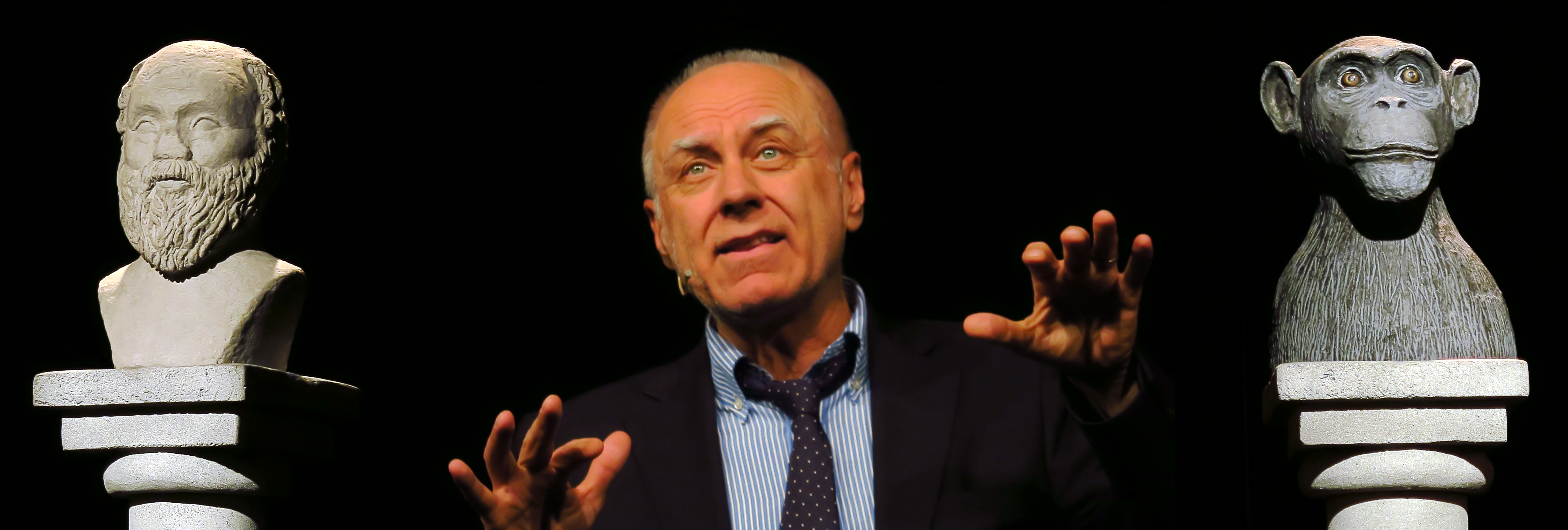 Kabarettist Bruno Jonas mit seinem Solo-Programm So samma mia mit den Bühnenrequesiten "Sokrates" und "Willi Jonas" im September 2015